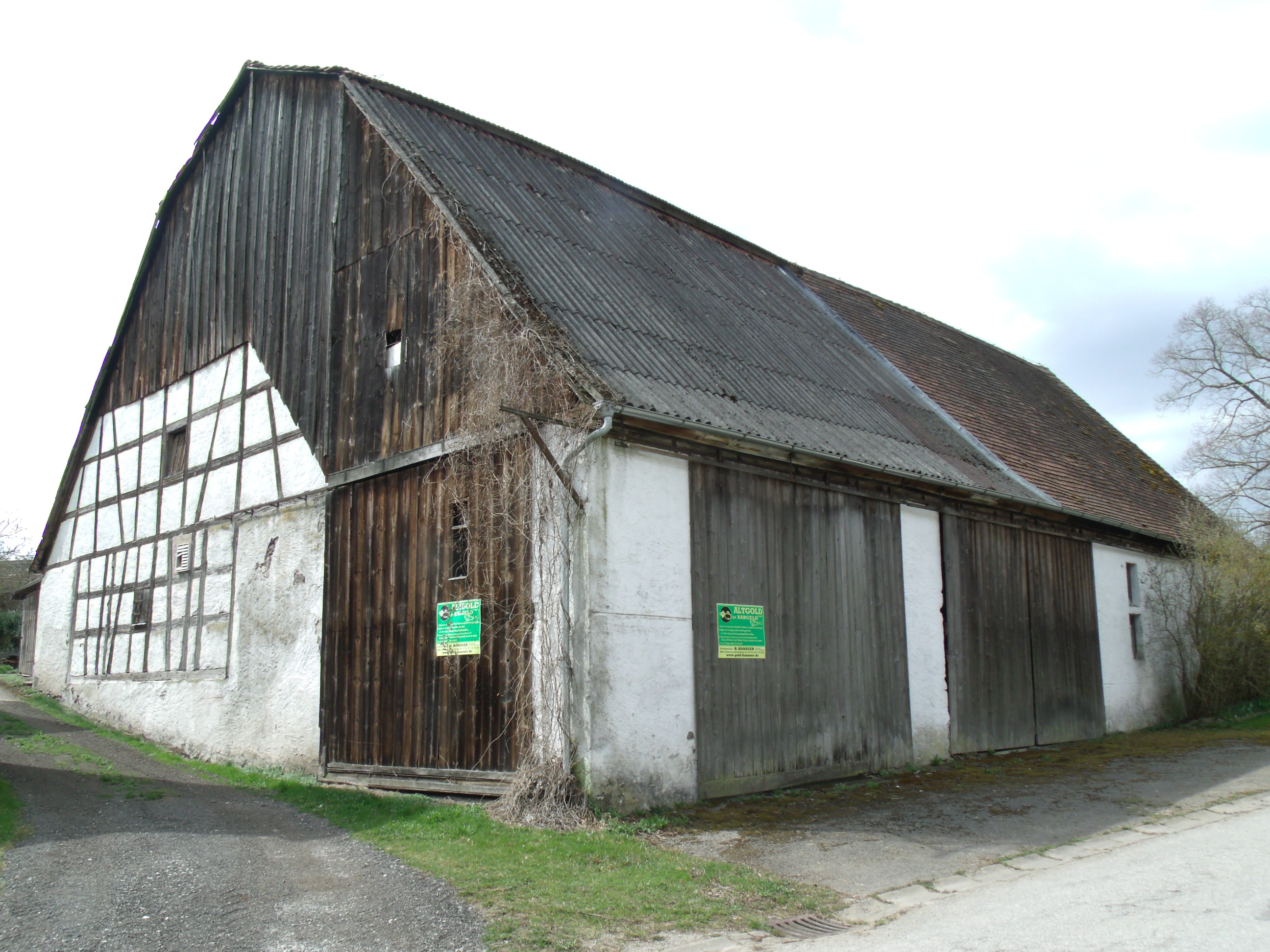 Fachwerkscheune in Hinterholz, Ortsteil von Leutershausen im mittelfränkischen Landkreis Ansbach